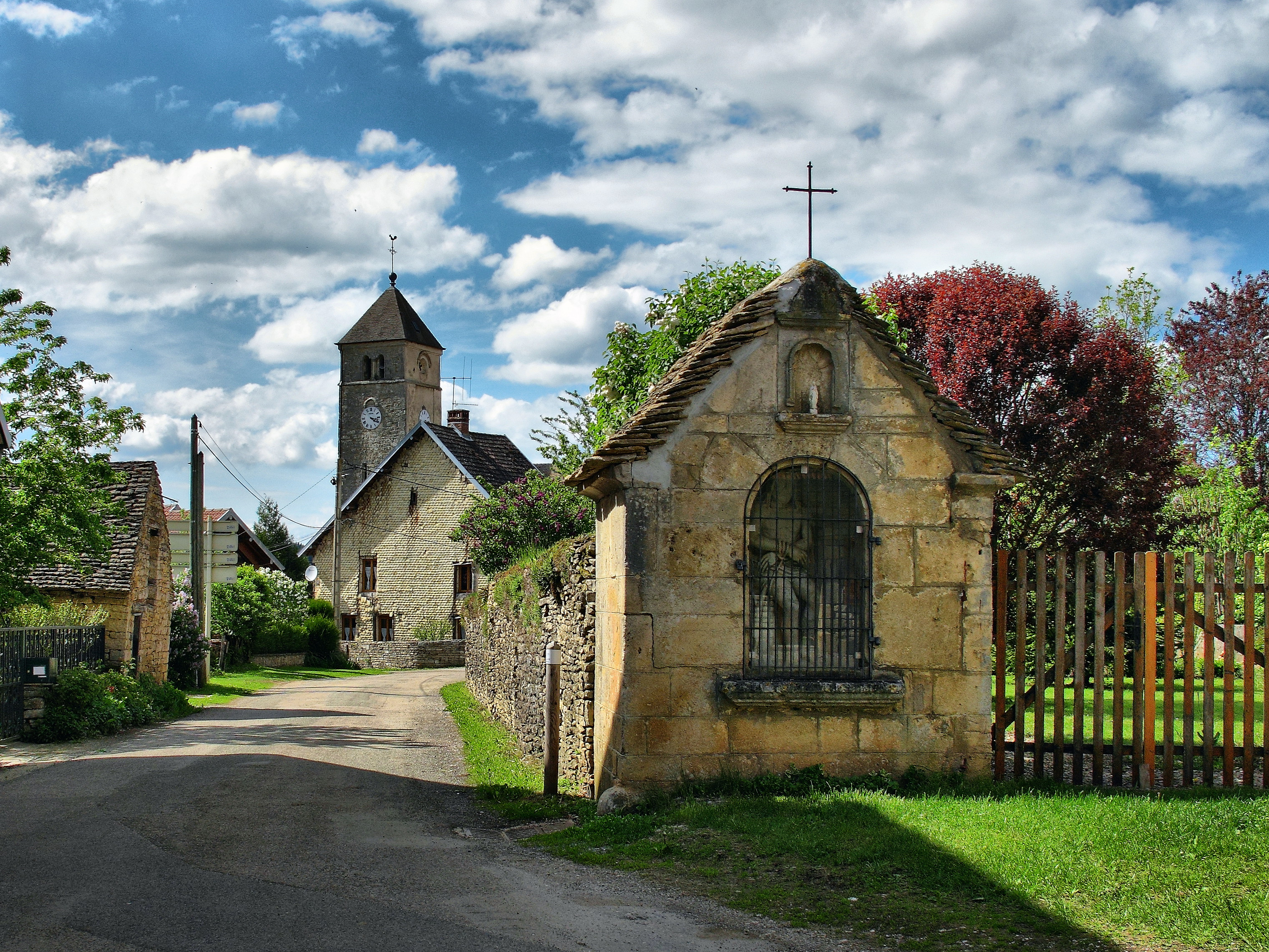 Oratoire du Dieu de Pitié et église de Lizine